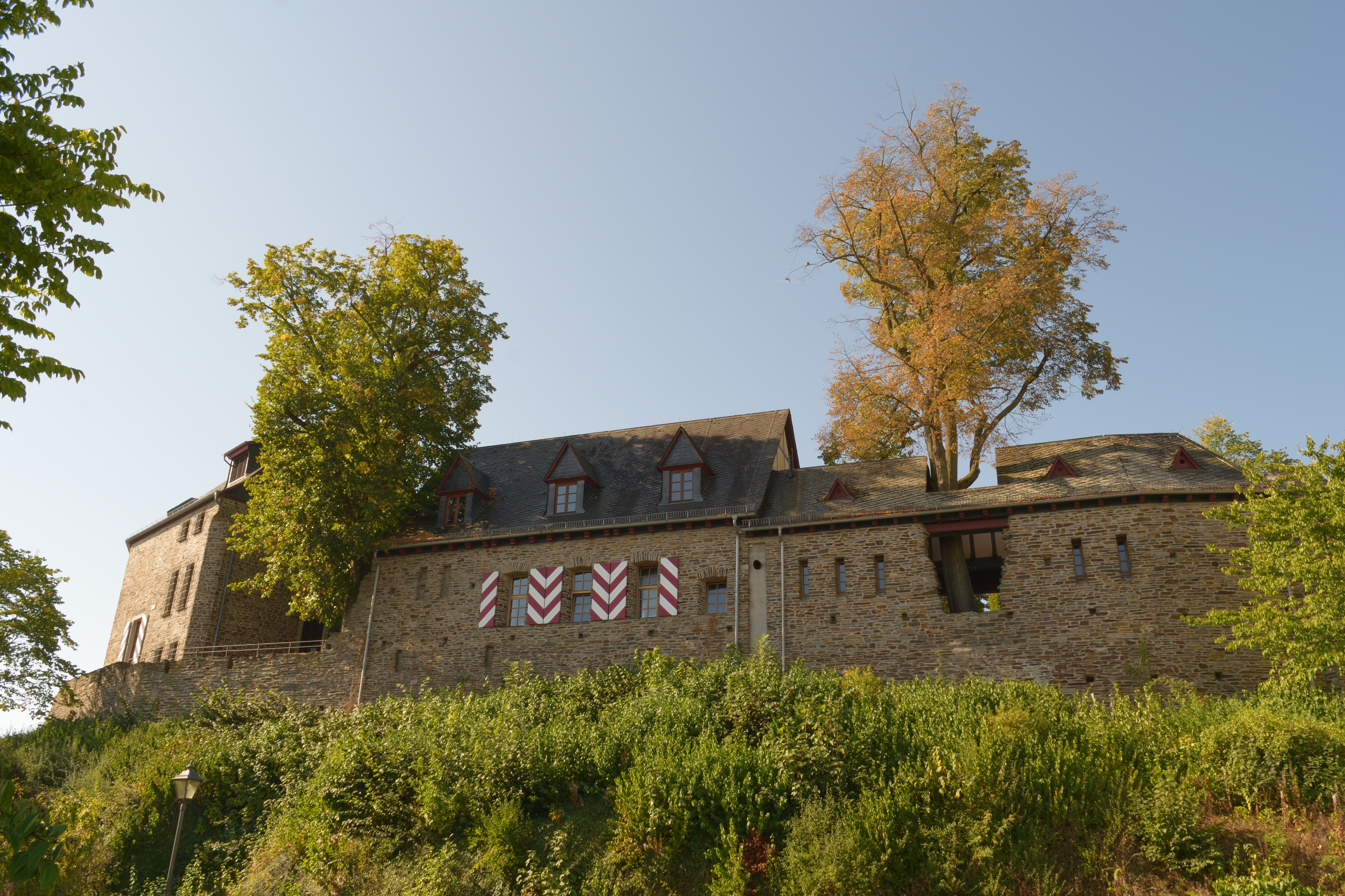 Die modern restaurierte Unterburgseite der Burg Kastellaun aus nordöstlicher Ansicht.